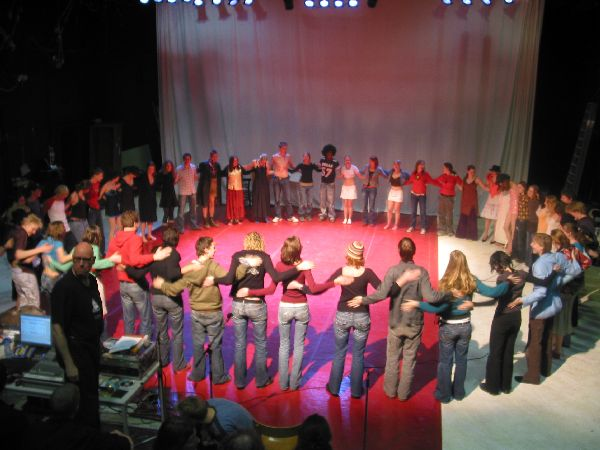 De groep van Dichterbij 2006 die als opwarming een groepsknuffel doen.